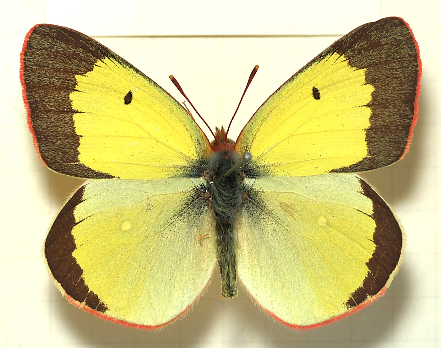 Colias palaeno